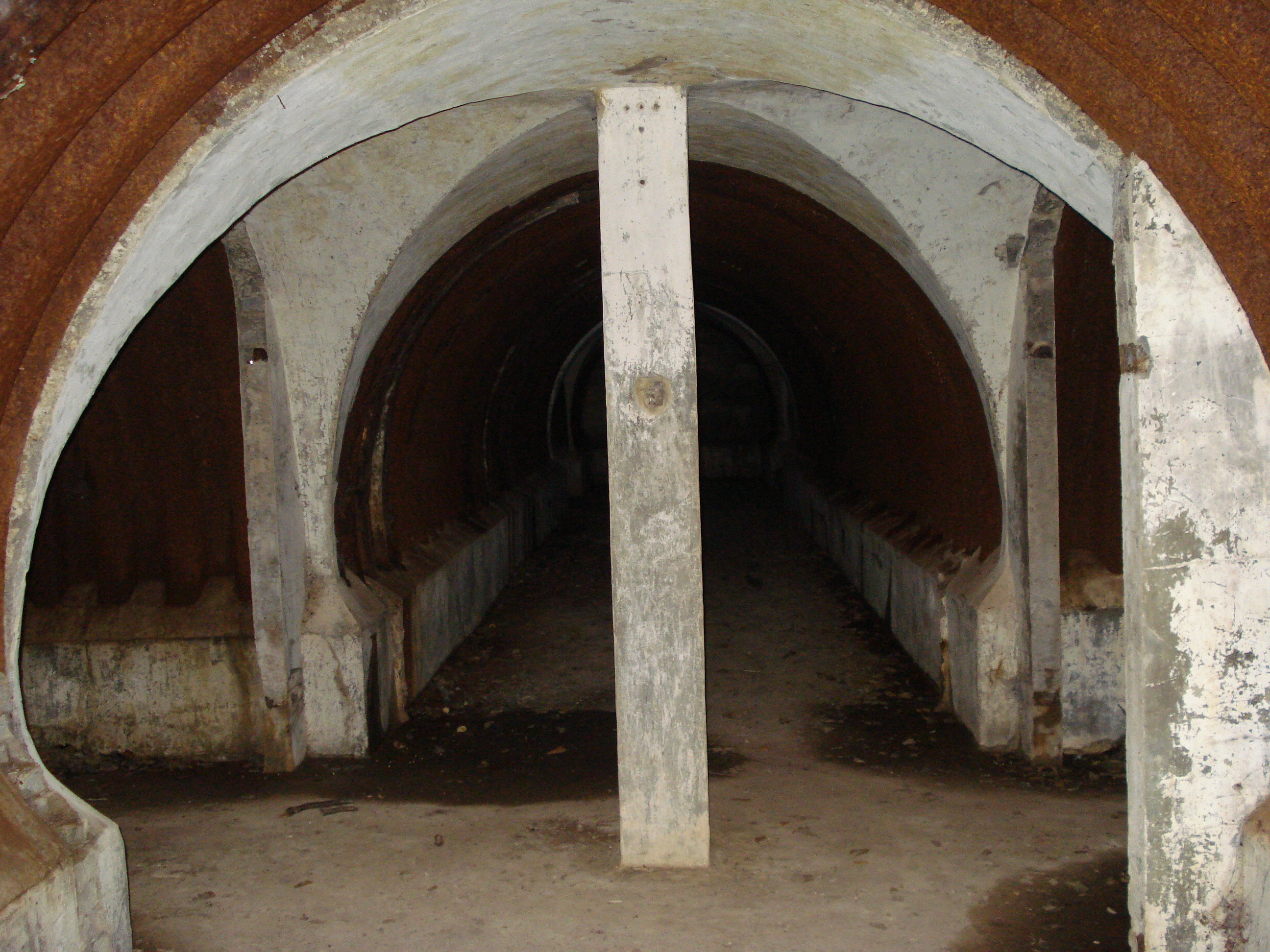 Poste de secours militaire souterrain de la Première Guerre mondiale (construit de fin 1916 à début 1918) classé monument historique